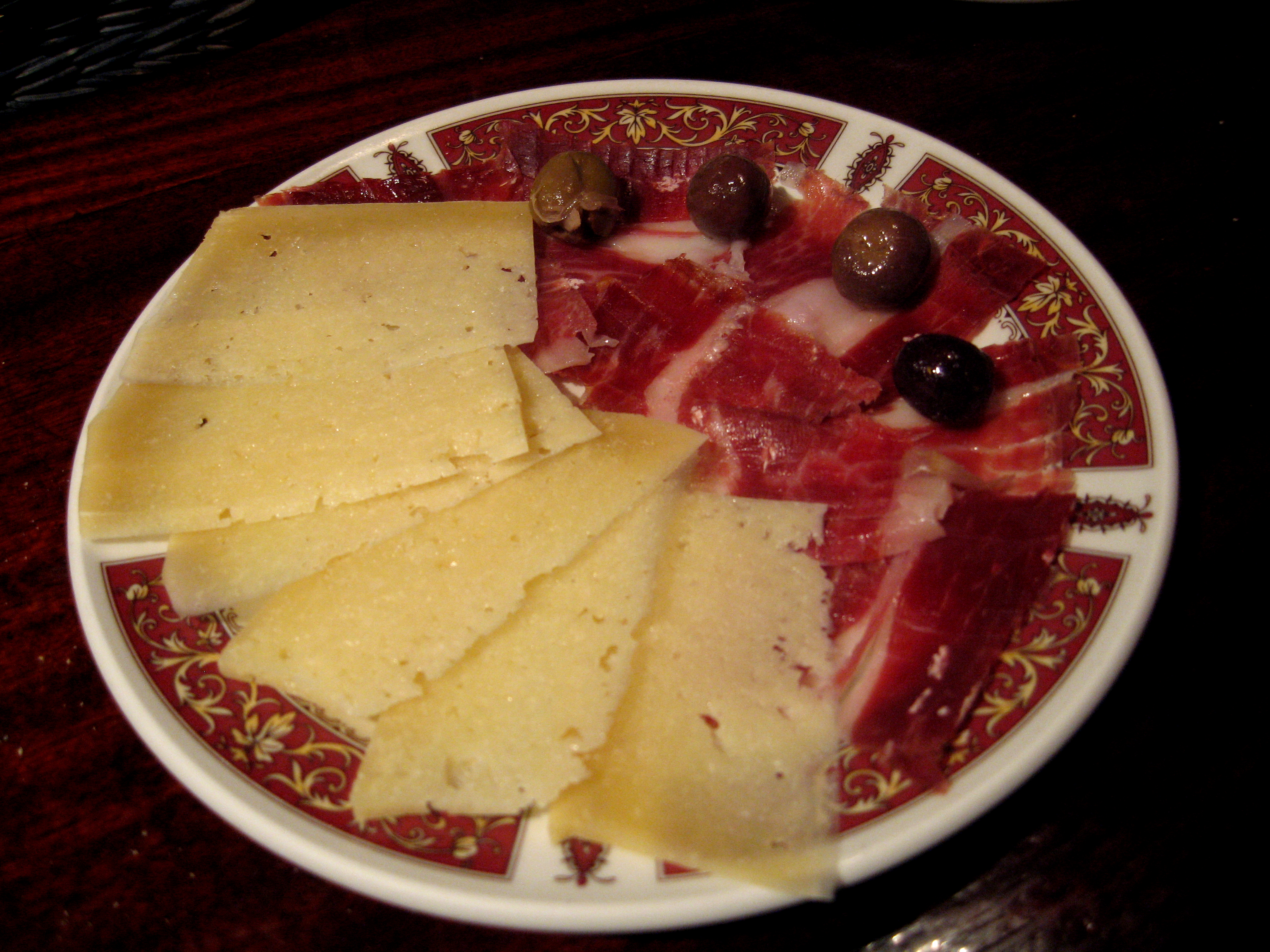 Tapa de jamón y queso decorada con olivas